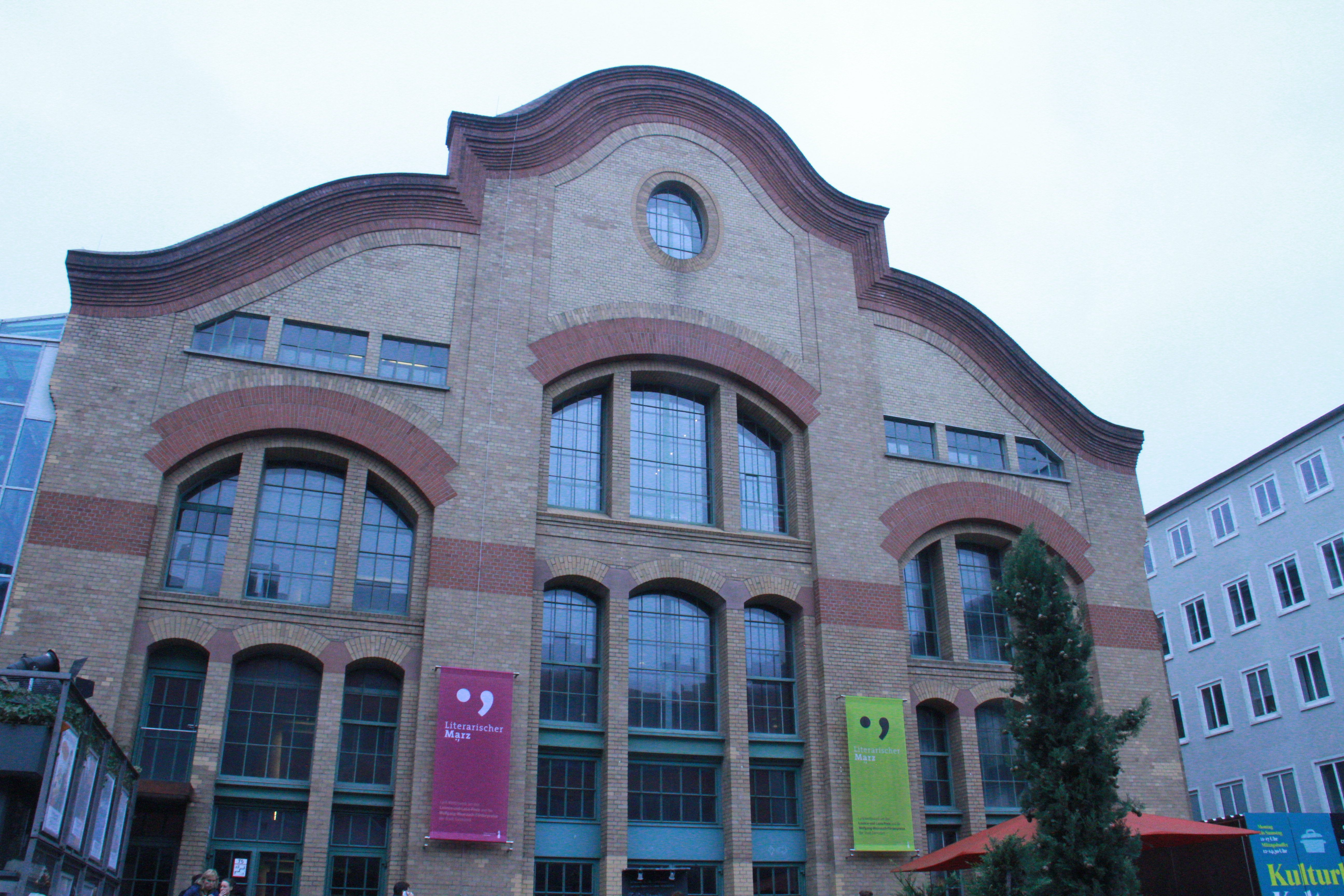 Die Centralstation in Darmstadt während des literarischen Märzes 2015 von außen